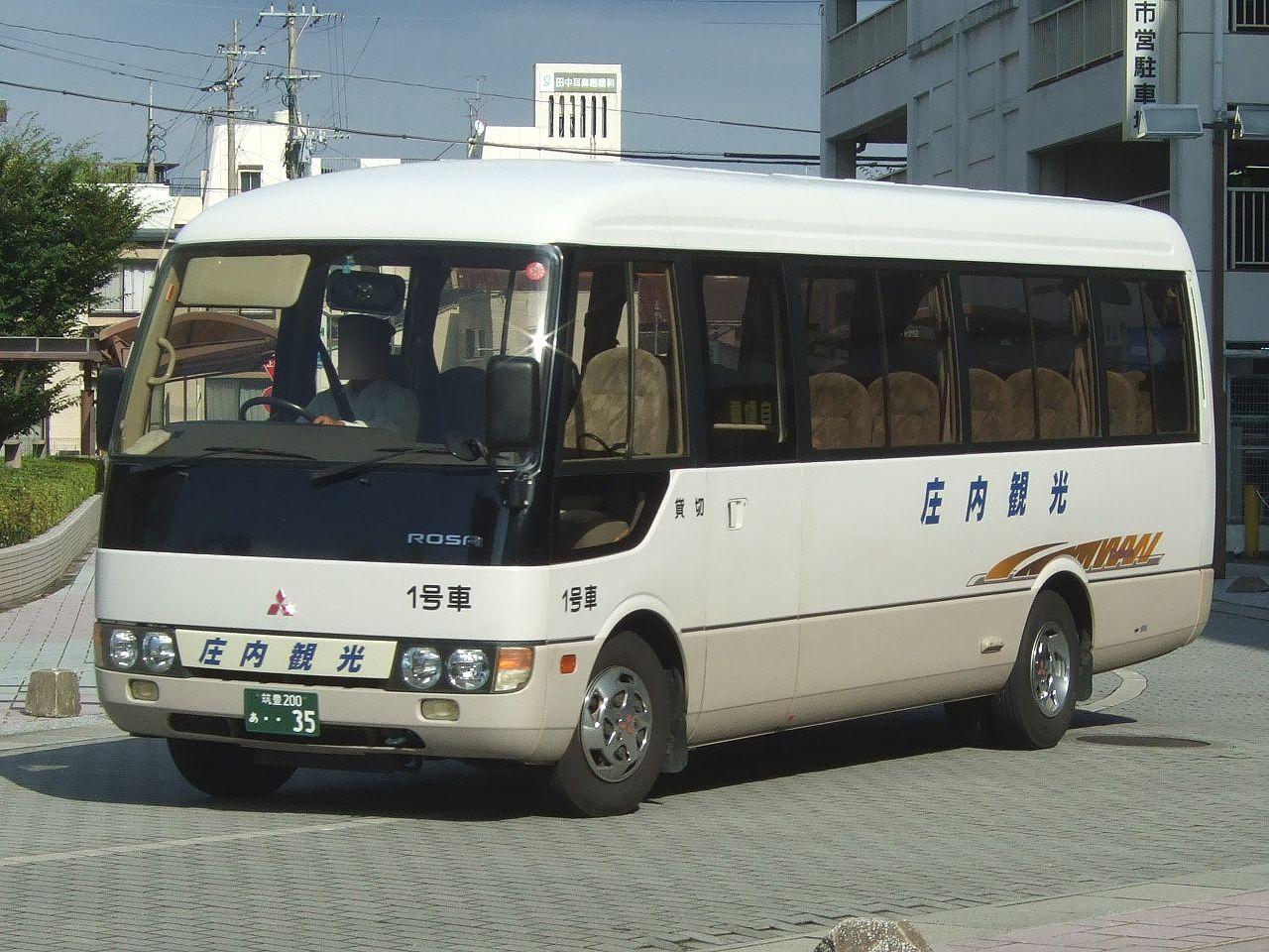 Iizuka City Community Bus 庄内観光の貸切車。飯塚市コミュニティバス庄内・飯塚線にも使用される。